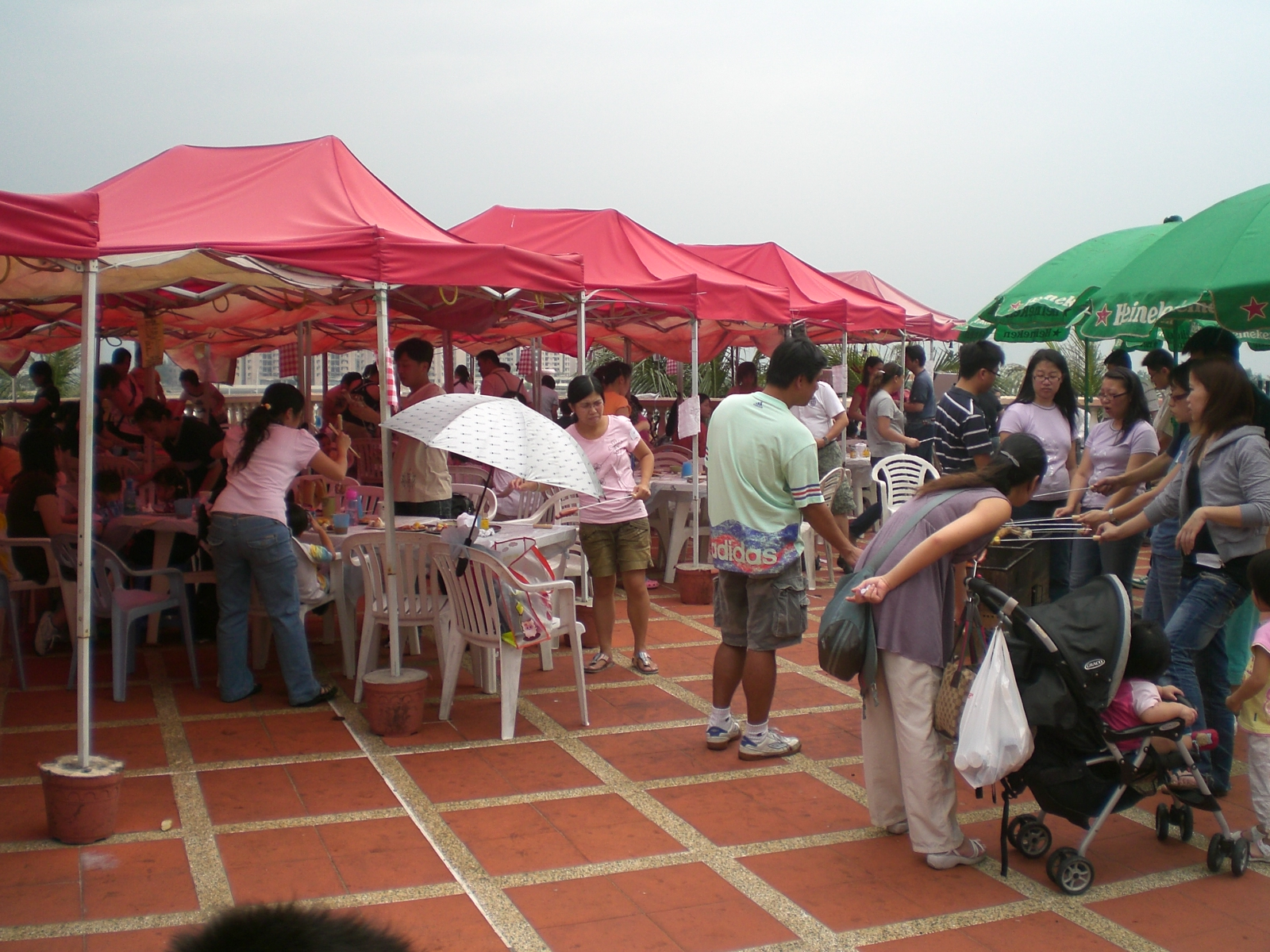 香港黃金海岸